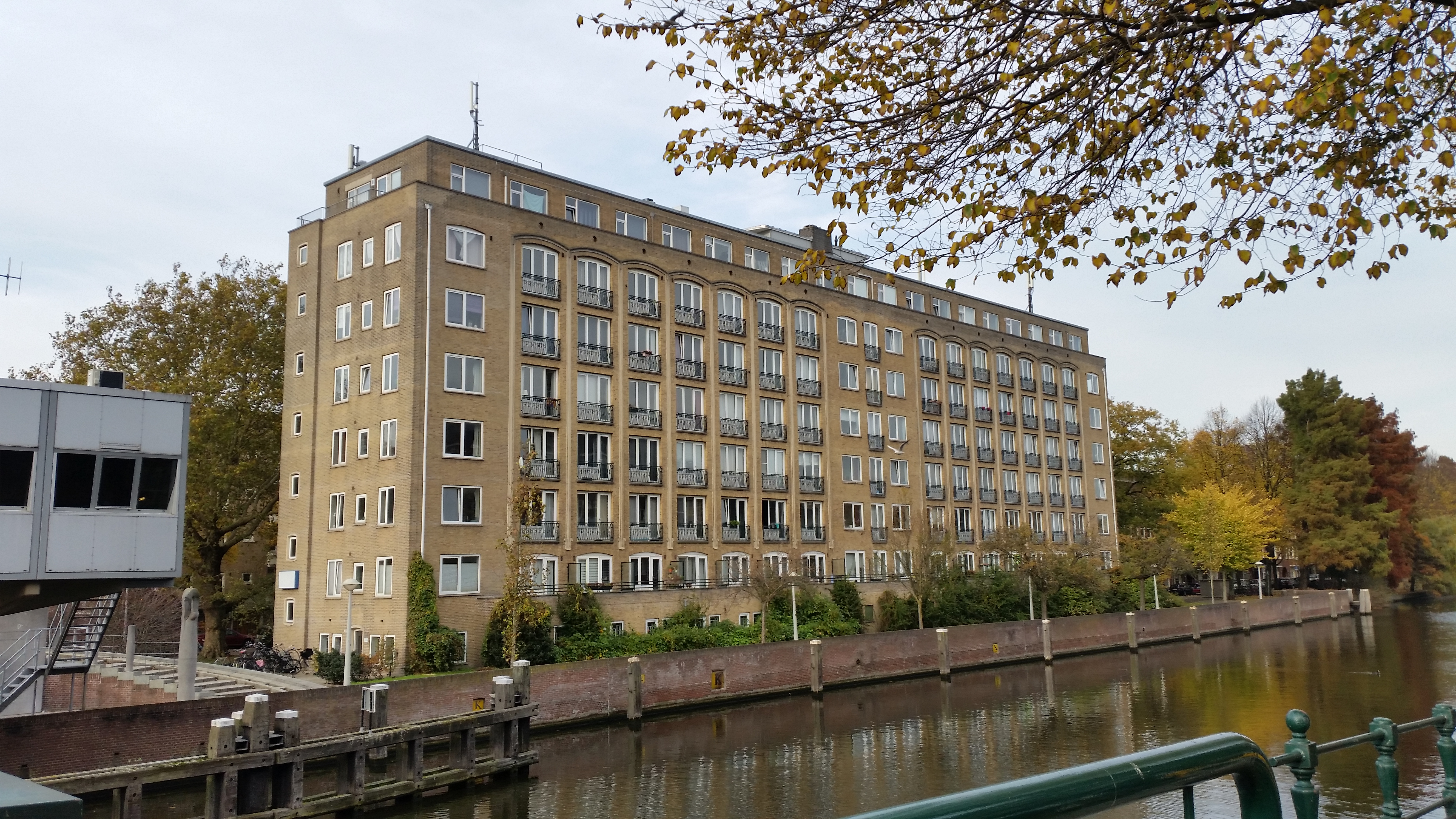 Amsterdam, Flatgebouw Oranjehof aan de Geuzenkade en de Korte Geuzenstraat (98-700), kopgevel Admiraal de Ruijterweg (26). Op de voorgrond zijn delen van de Wiegbrug, met brugwachtershuisje en het beeld Ankh te zien.